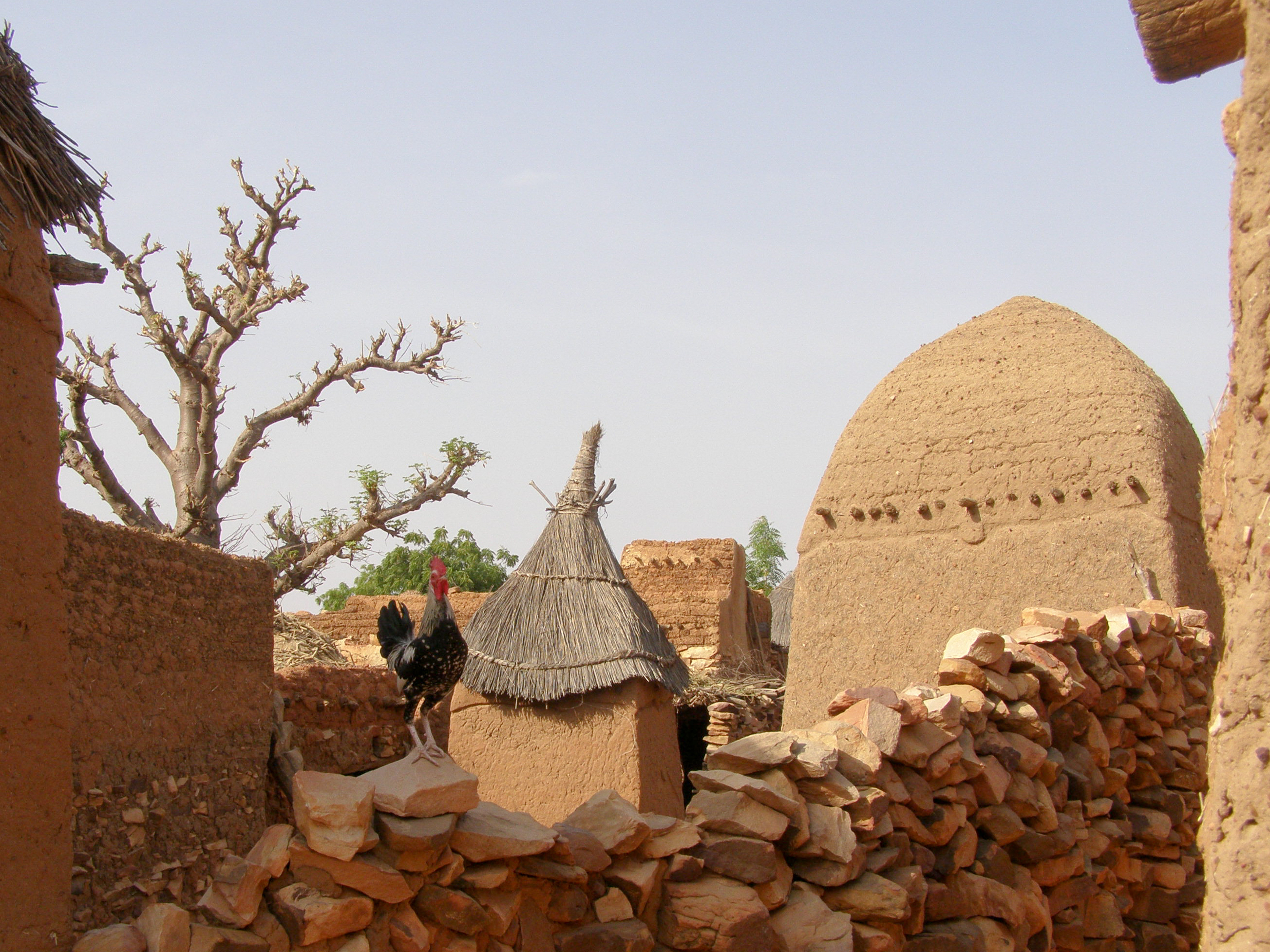 Songho - Pays Dogon - Mali